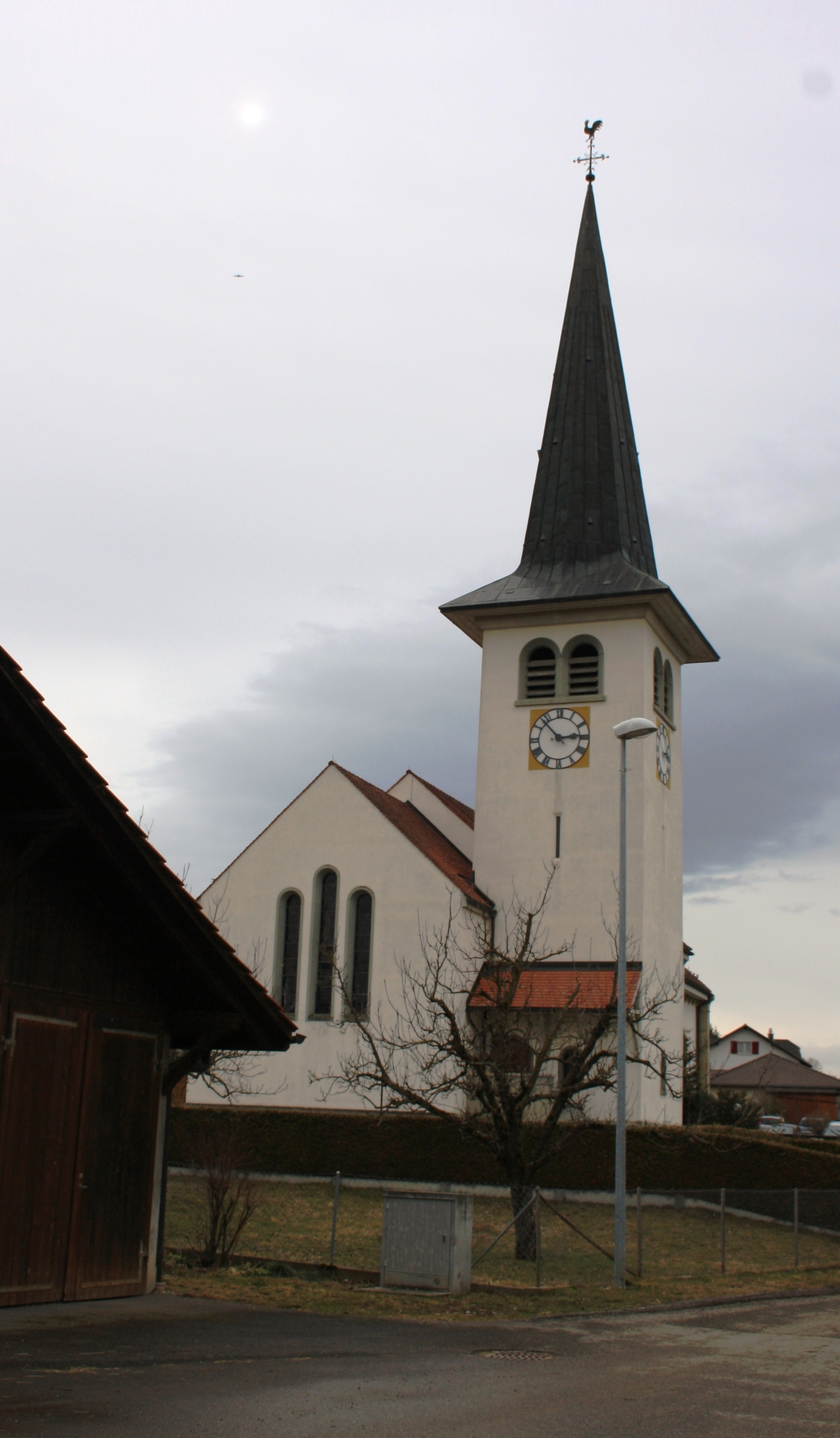 Röm.-kath. Kirche St. Ursen, Freiburg, Schweiz